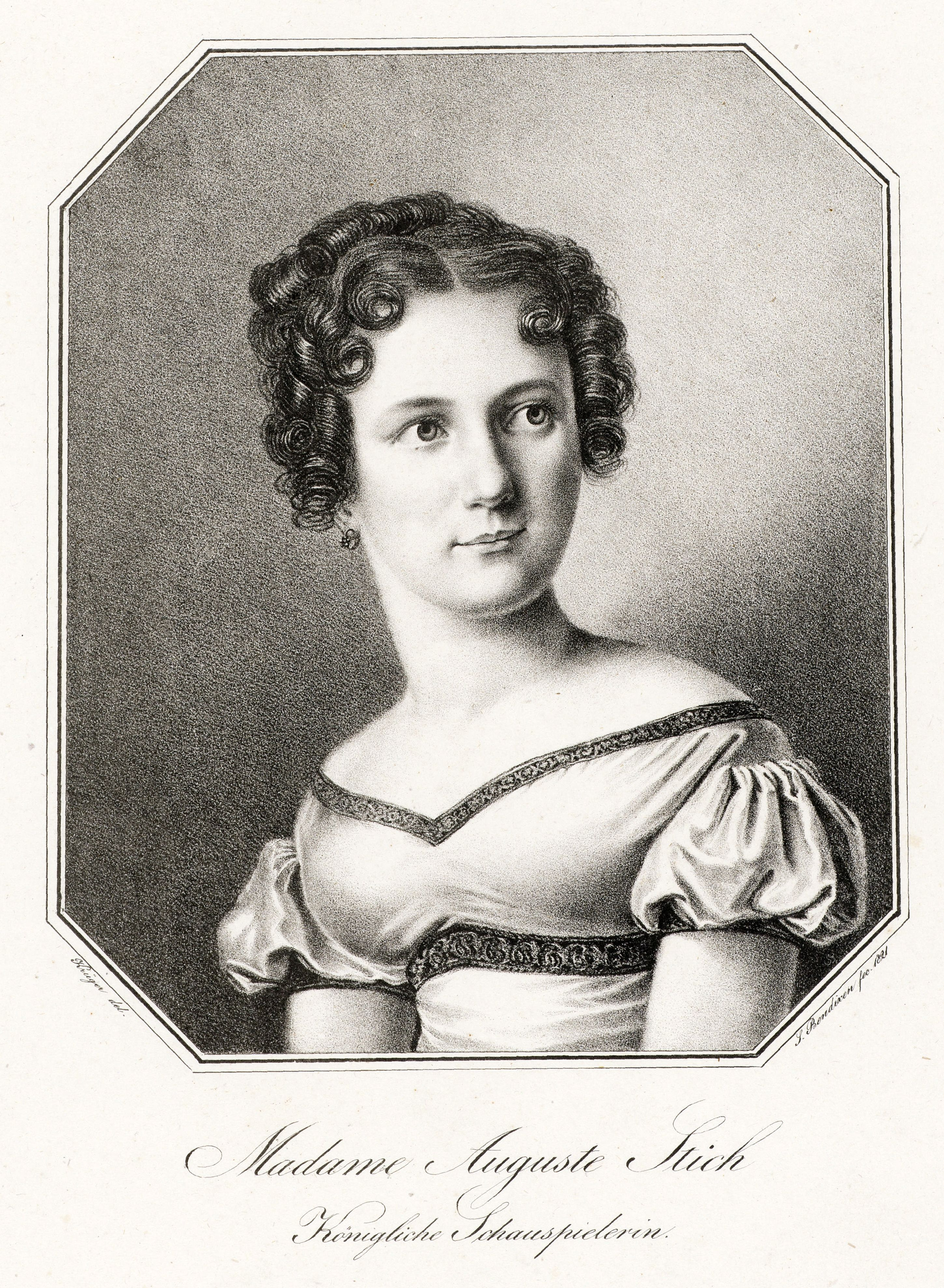 Madame Auguste Stich